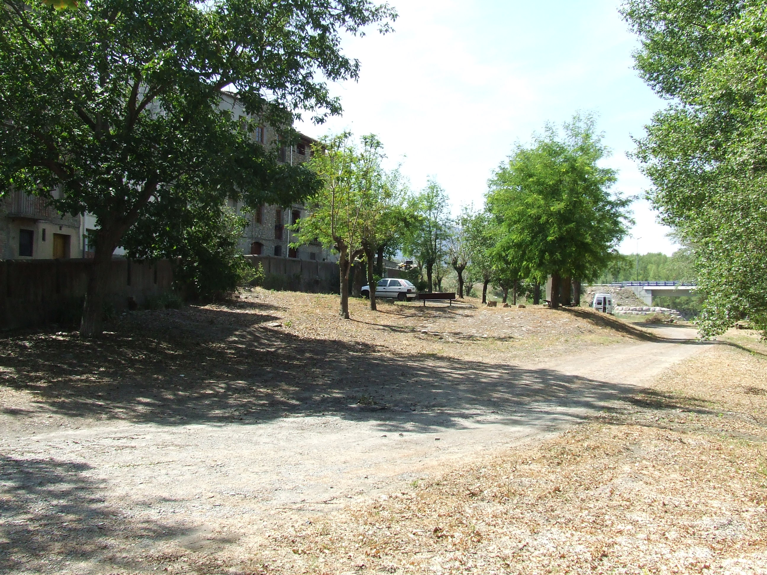 Lloc on hi hagué el carrer desaparegut del Pont de Claverol (Conca de Dalt, Pallars Jussà)